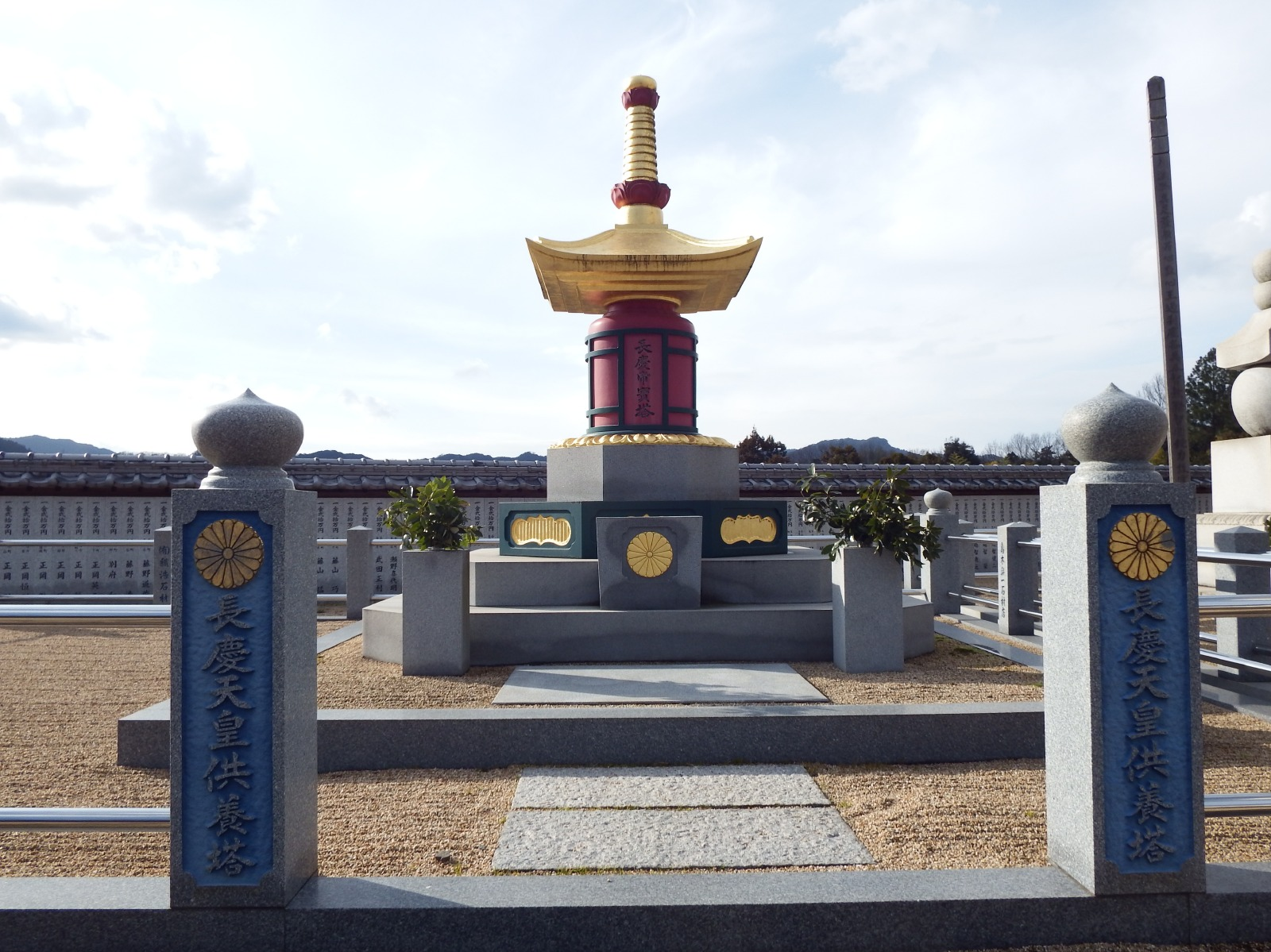 光林寺の長慶天皇供養塔